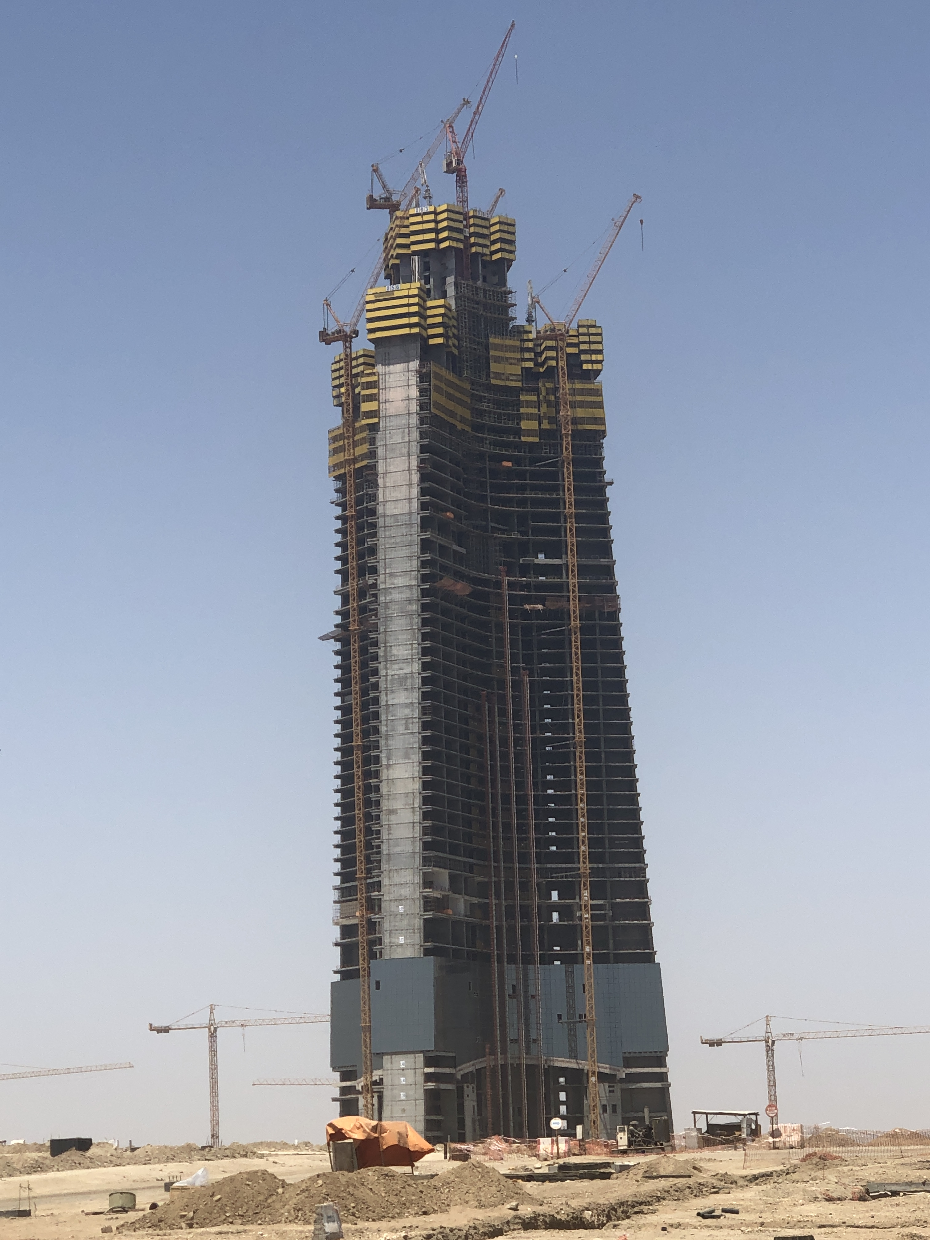 Bei meinem Besuch in Jeddah am 16.08.2019 aufgenommen